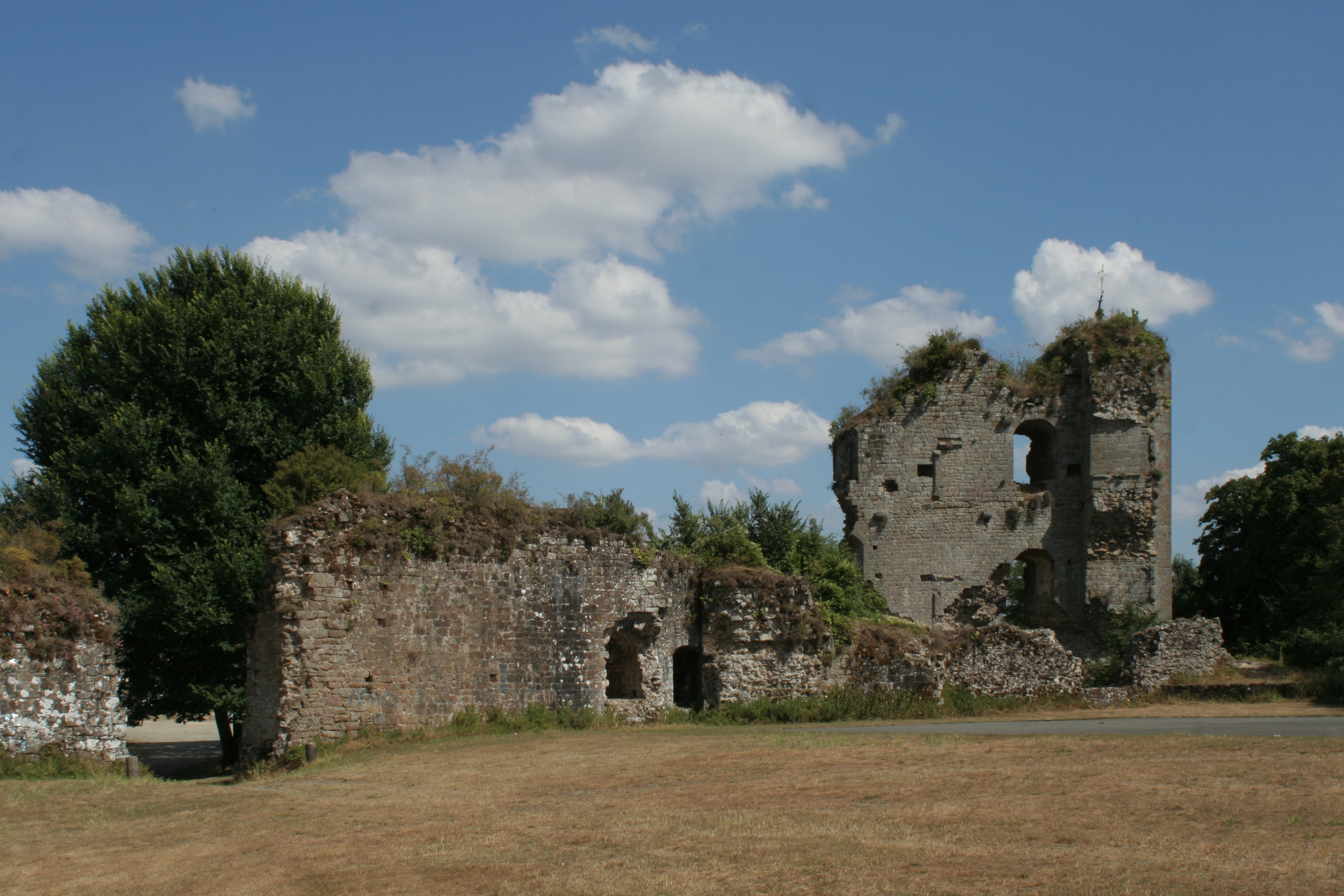 Hédé, Ille-et-Vilaine, Bretagne, France Ruines du château, vues de l'intérieur.